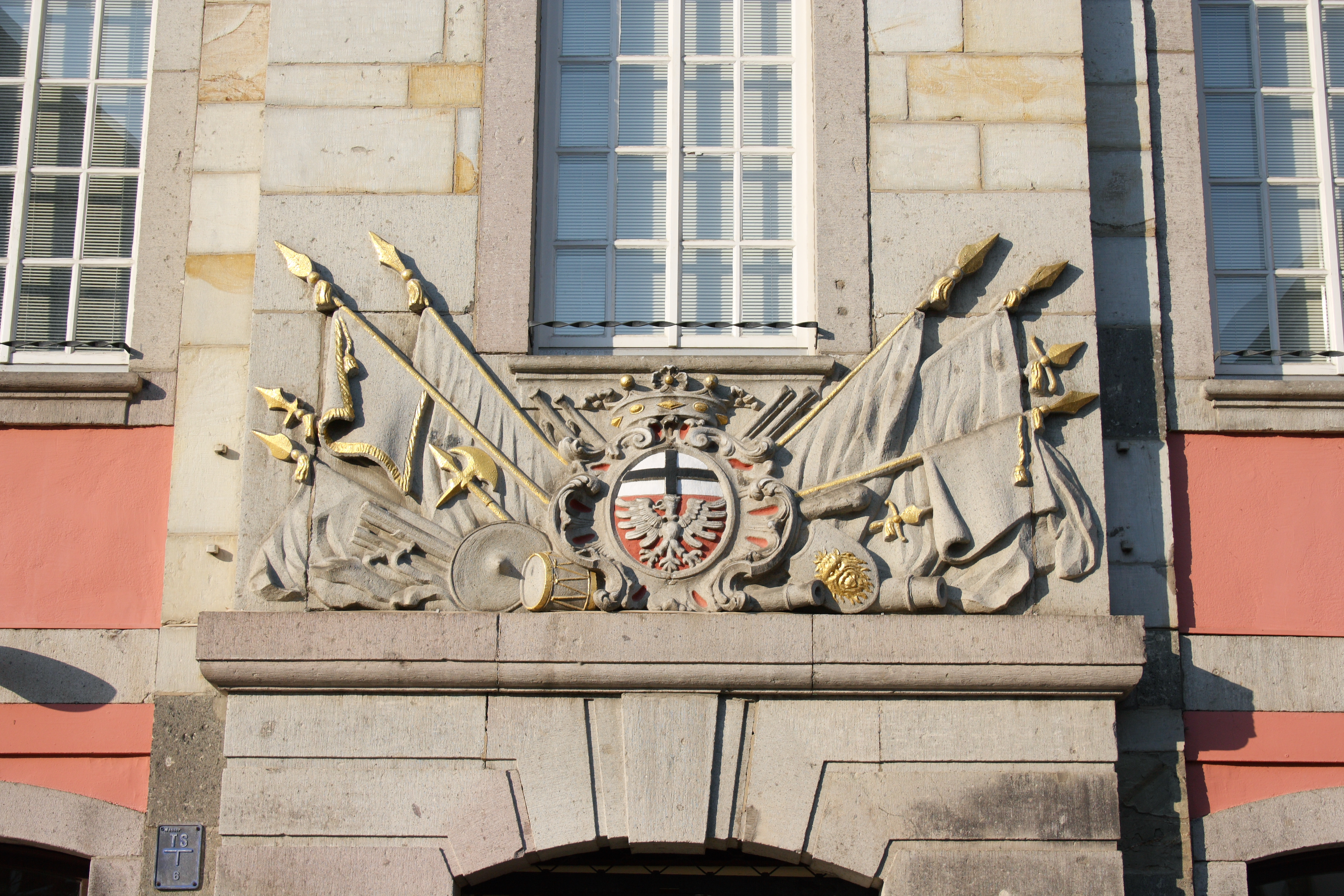 ehemalige Stadtwache in Ahrweiler, Marktplatz 28